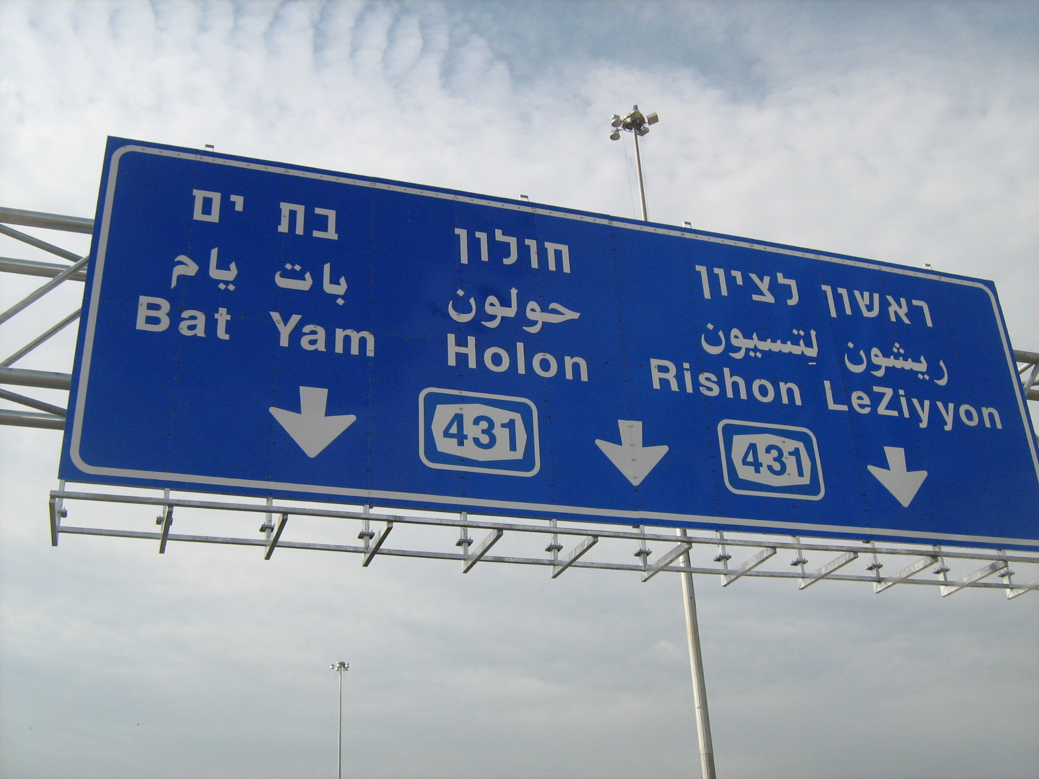 כביש 431 שילוט